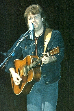 Ricky Skaggs - April 1988